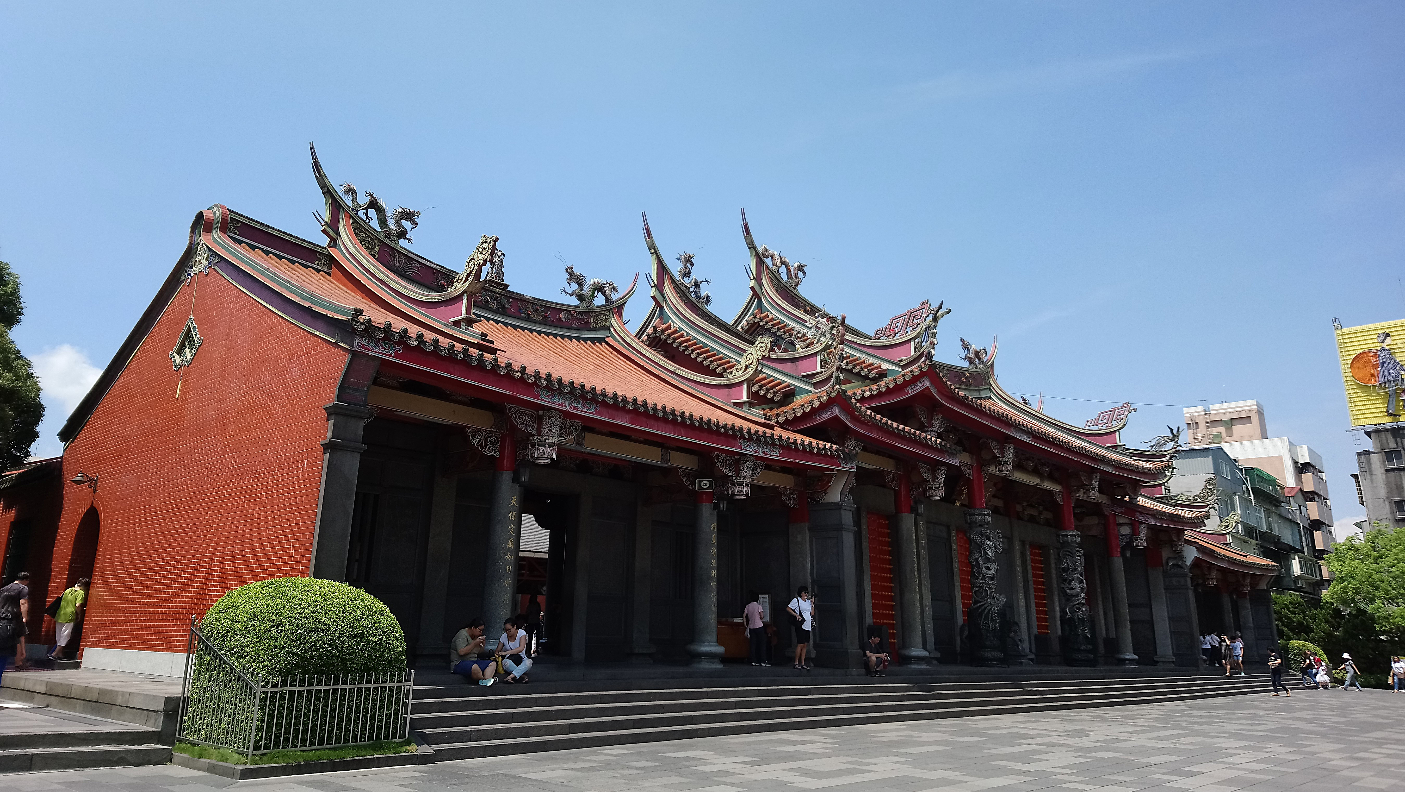 行天宮臺北本宮,臺北市中山區下埤頭次分區行政里